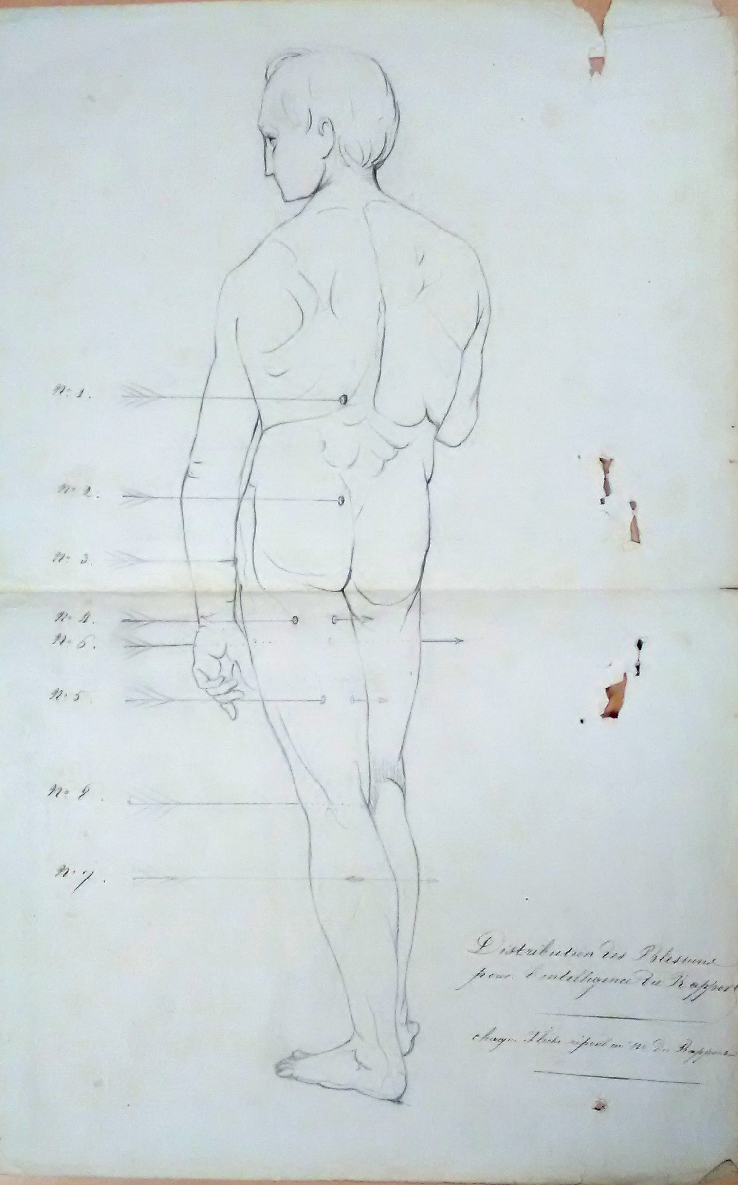 Ce document date de 1857 - Document consultable aux archives départementales de l'Eure à Évreux.